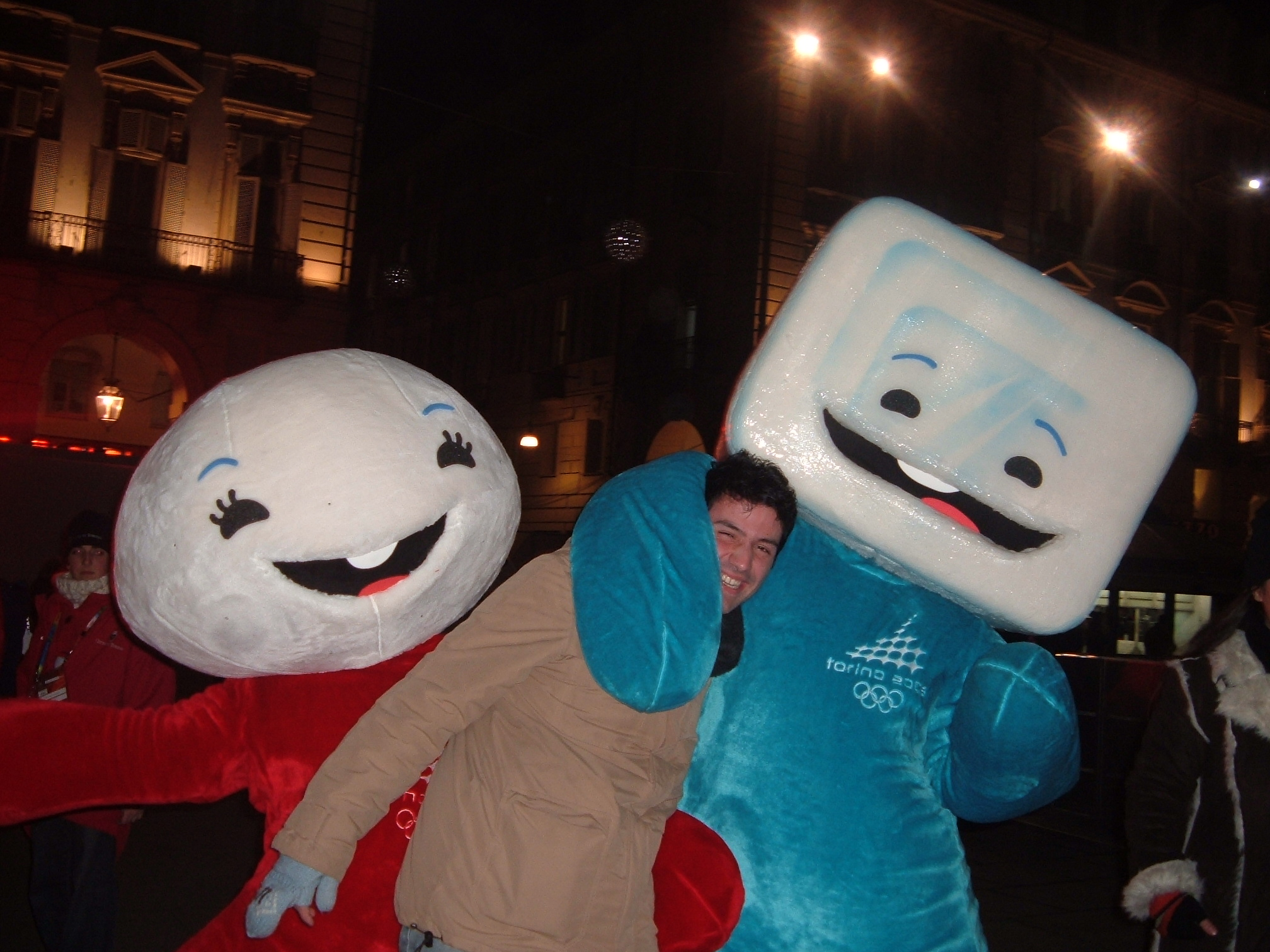 Luigi Capozzi